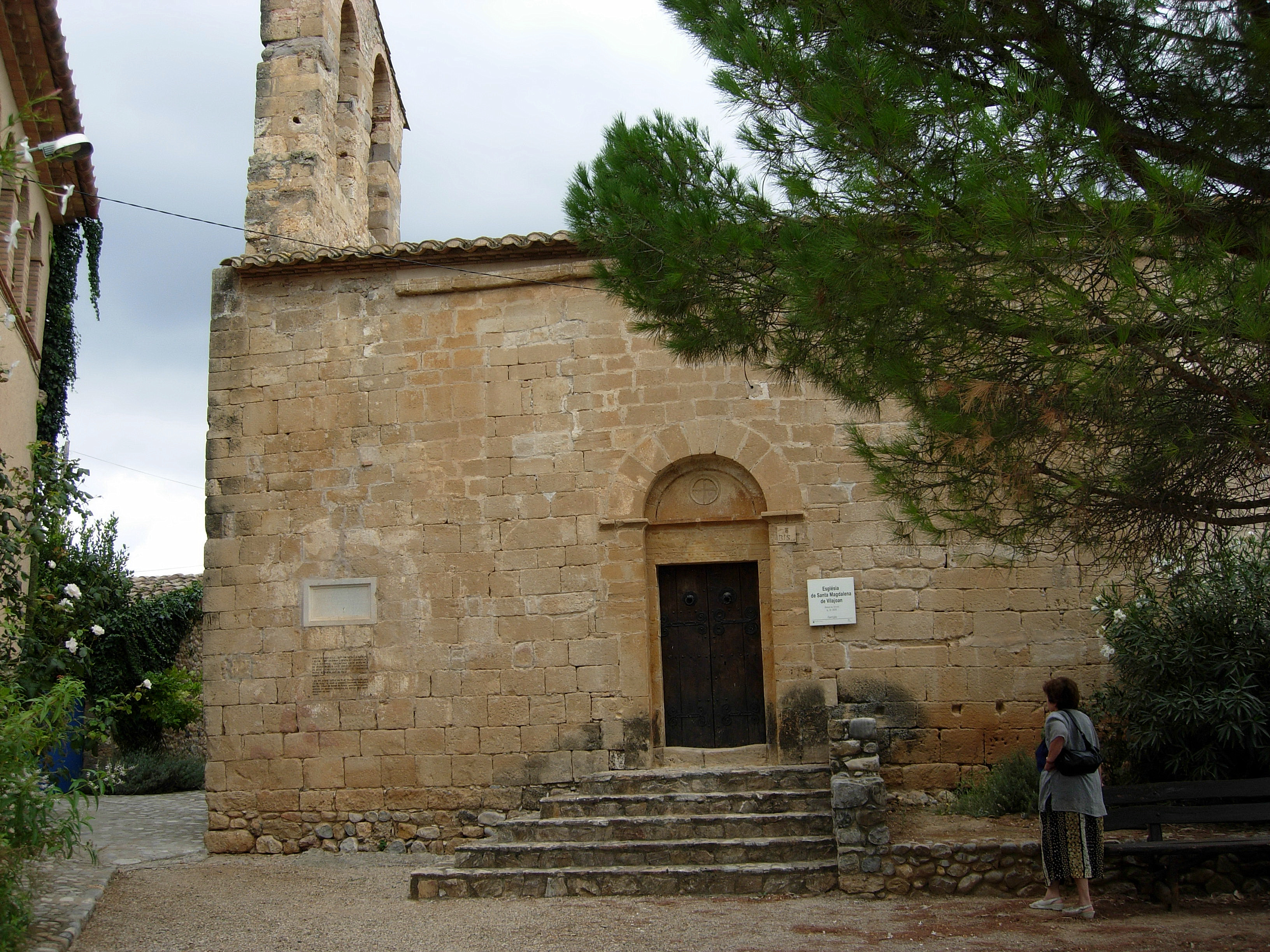 esglèsia Sta Maria